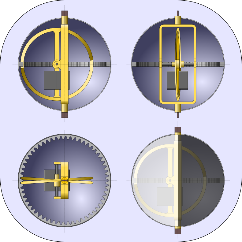 Schema vnitřního stroje měsíce Pražského orloje